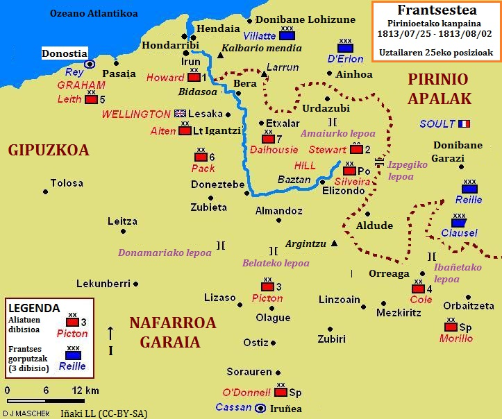 Pirinioetako kanpainako posizio militarrak, Frantsestea (1813ko uztailaren 25a)